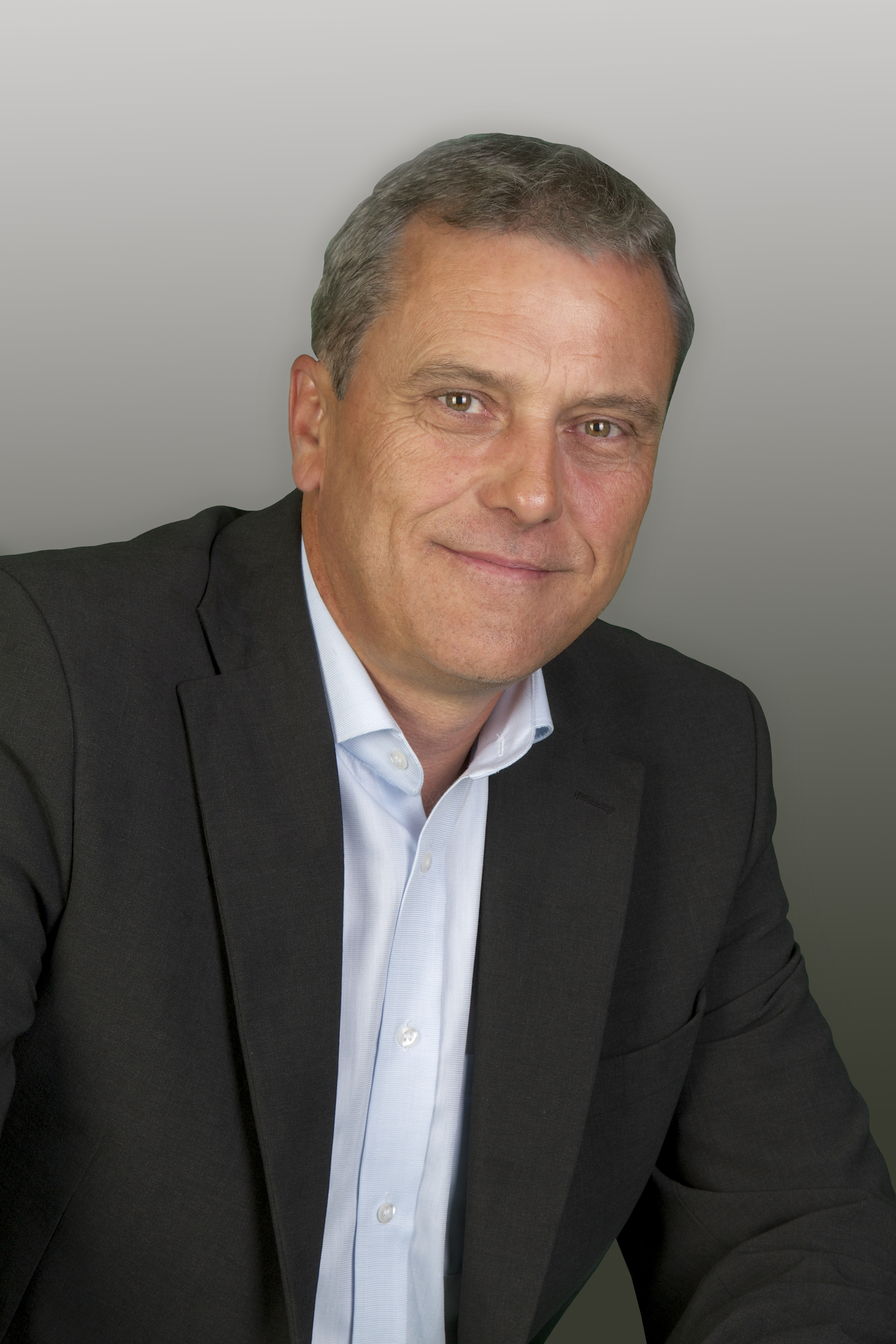 Hejtman Olomouckého kraje